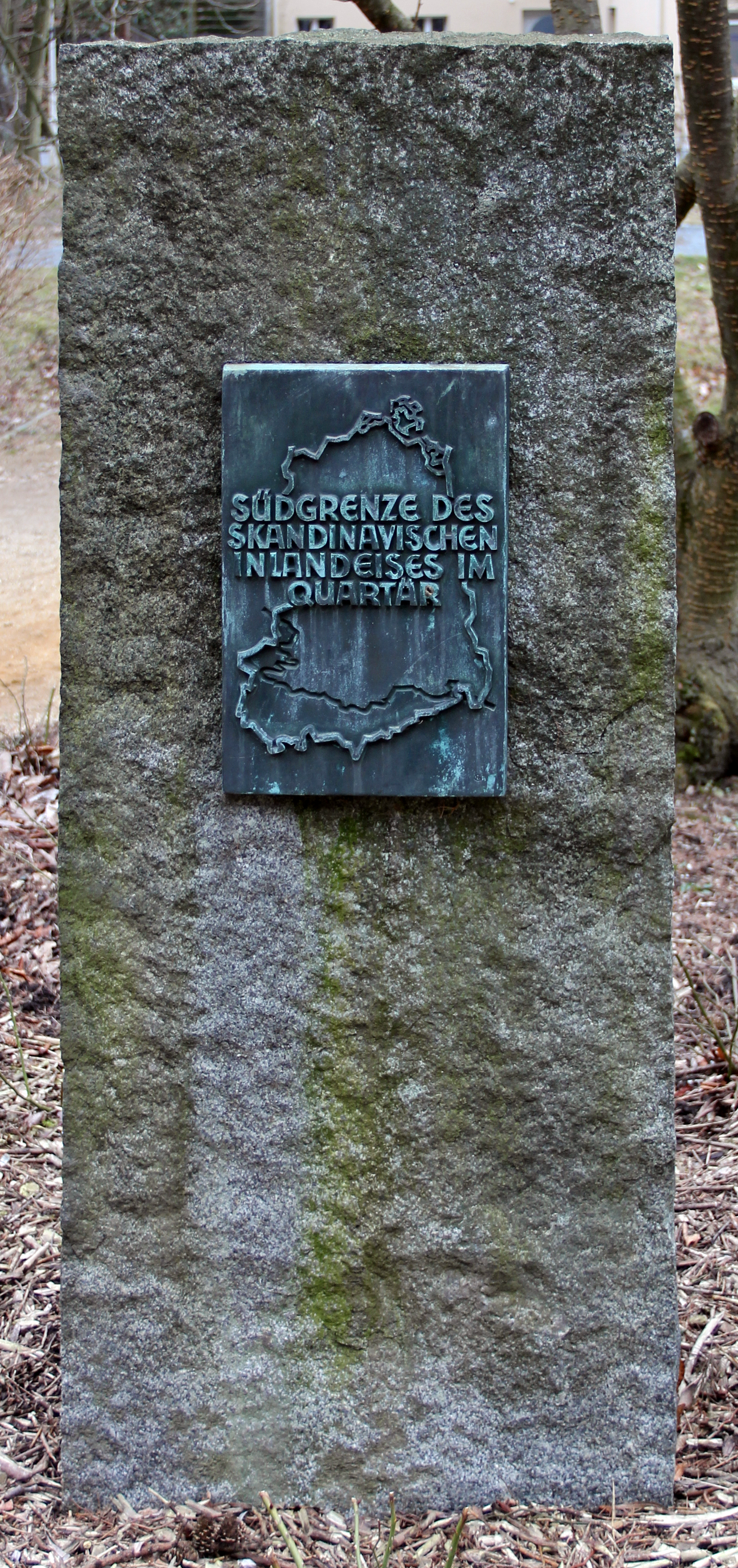 Gedenkstein, Südgrenze des skandinavischen Innlandeises im Quartär, Kirnitzschtalstraße, Bad Schandau, Deutschland